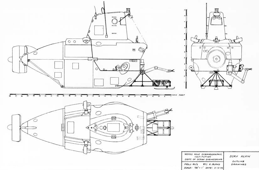 3-side drawing of DSV Alvin